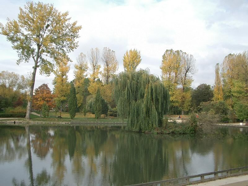 Photo prise par mon voisin en aout 2006